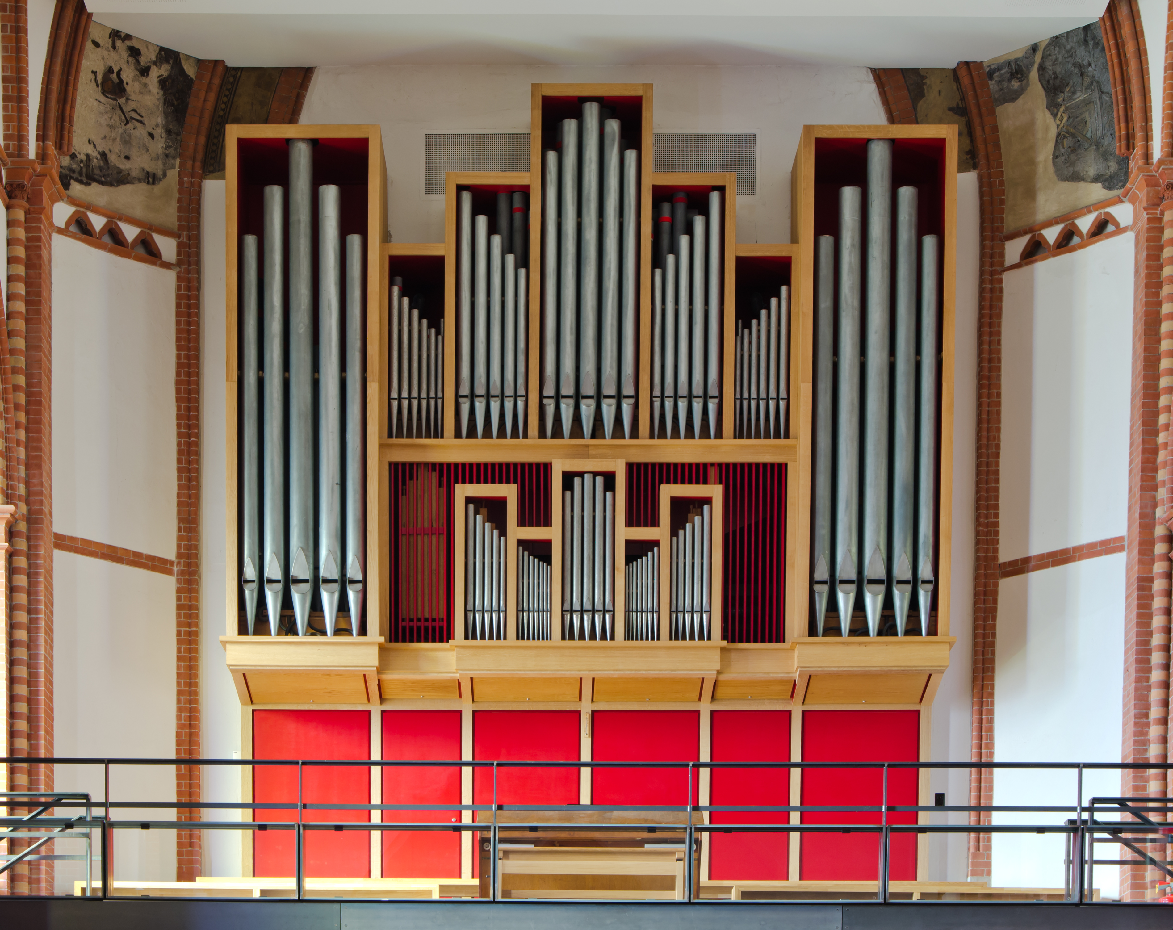 Hamburg Christuskirche OrgelThis is a photograph of an architectural monument.